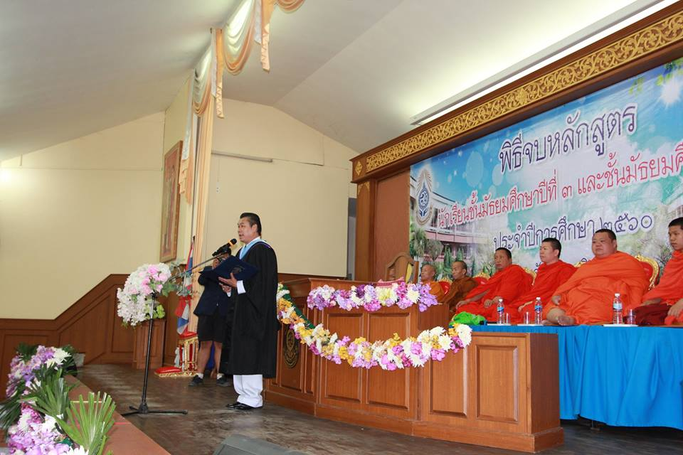 พิธีปัจฉิมนิเทศและจบหลักสูตร ส.ว. 4